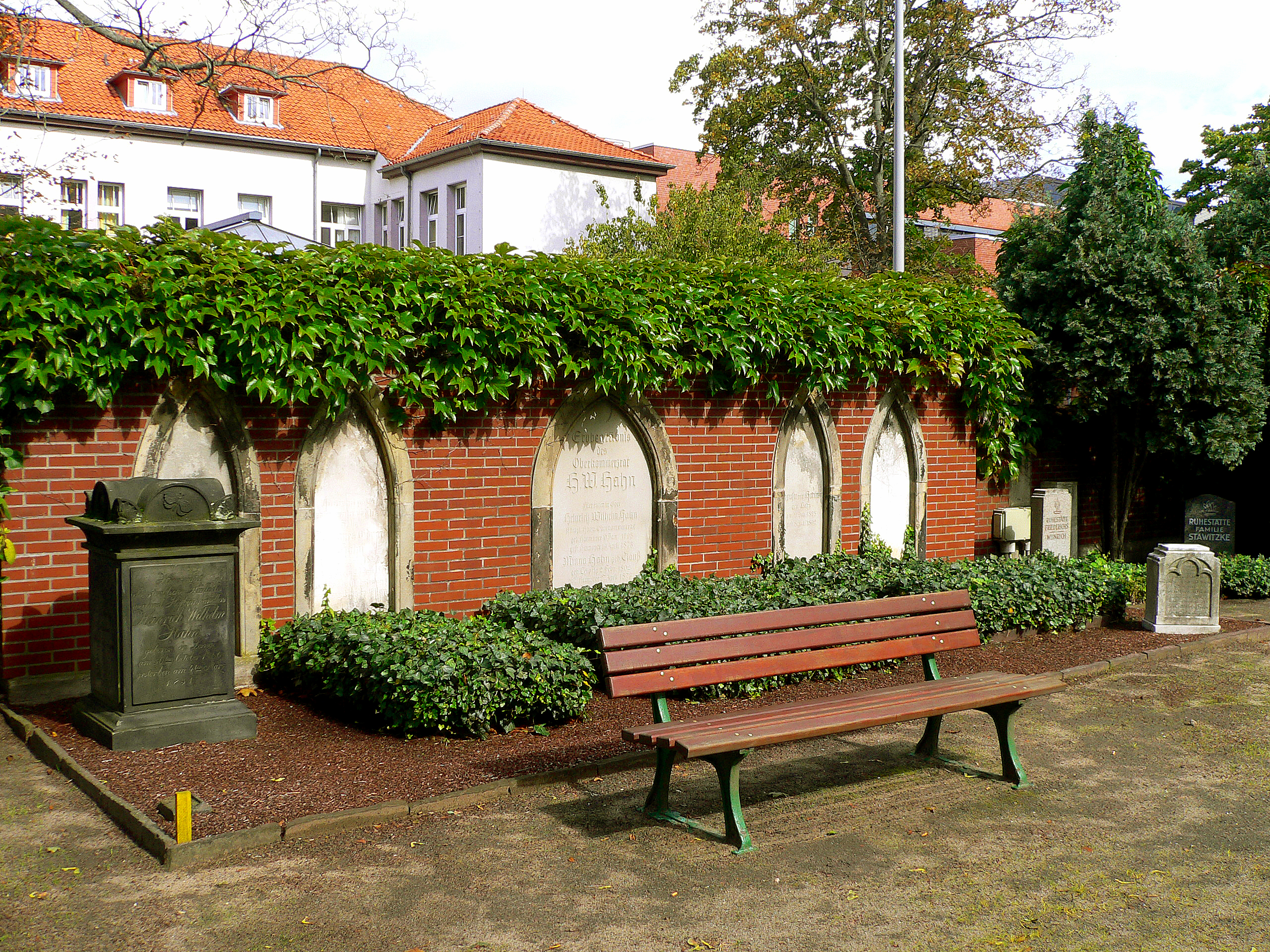 Erbbegräbnis Heinrich Wilhelm Hahn der Jüngere (1795-1873) inklusive versetztem Grabstein von Heinrich Wilhelm Hahn der Ältere auf dem Neuen St. Nikolai Friedhof im hannoverschen Stadtteil Nordstadt